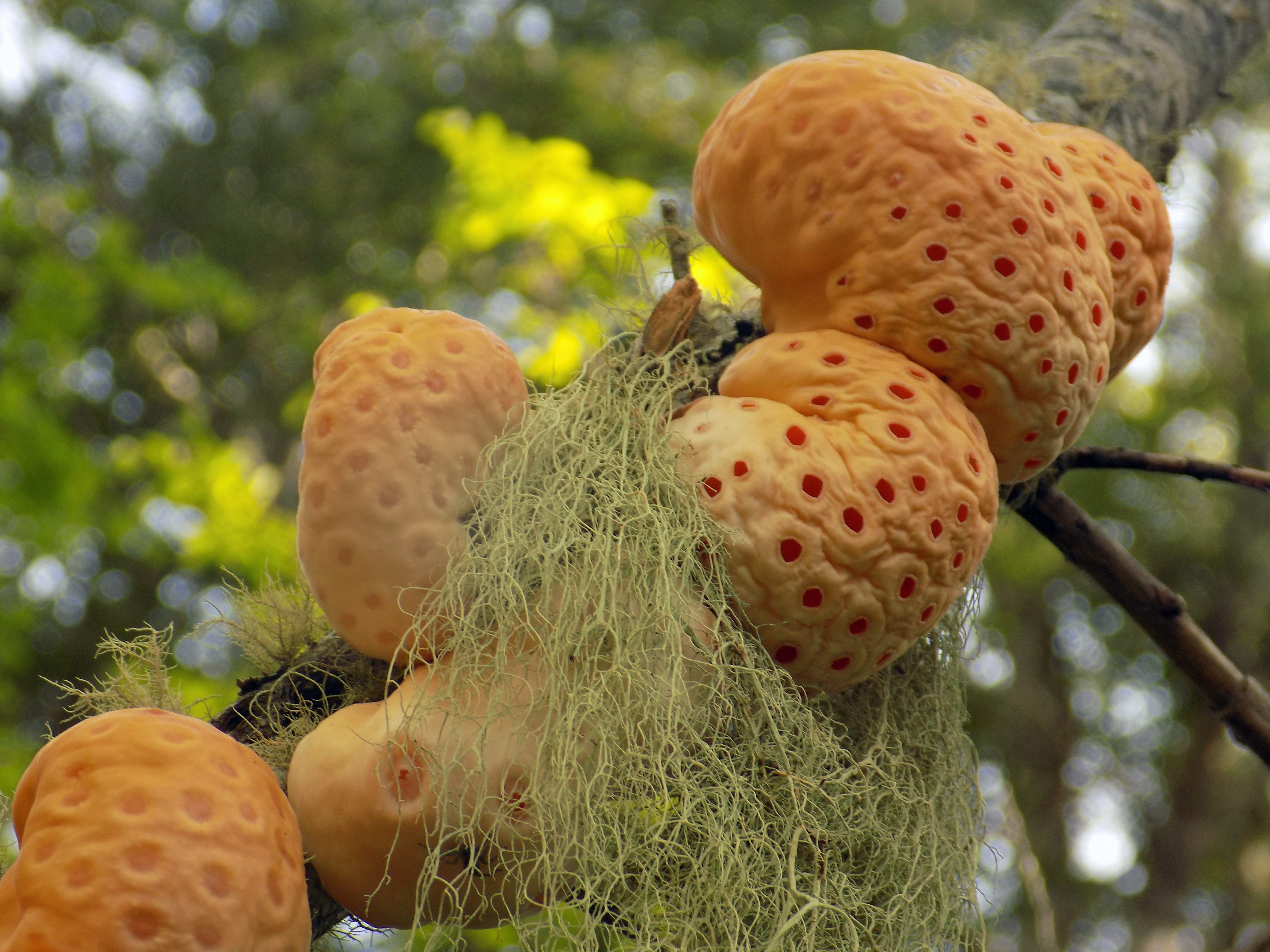 Cyttaria berteroi Berk. Image location: Trongol Alto, Curanilahue, Biobío Region, Chile Su nombre común es “Pinatra”, es un hongo parásito biotrófico, cuyos estromas crecen solitarios o en grupos distribuidos en hileras como se puede observar en las imágenes. Los ejemplares maduros miden hasta 12 cm (es la Cyttaria más grande de las siete especies de este género presentes en Chile) y fructifican en primavera sobre árboles del género Nothofagus. Estos ejemplares se encontraban creciendo sobre N. dombeyi. Recognized by sight Used references: Espinosa (1926), Gamundí (1971) For more information about this, see the observation page at Mushroom Observer.